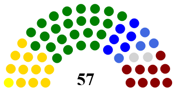 Composición de la Asamblea Legislativa en el período 2010-2014